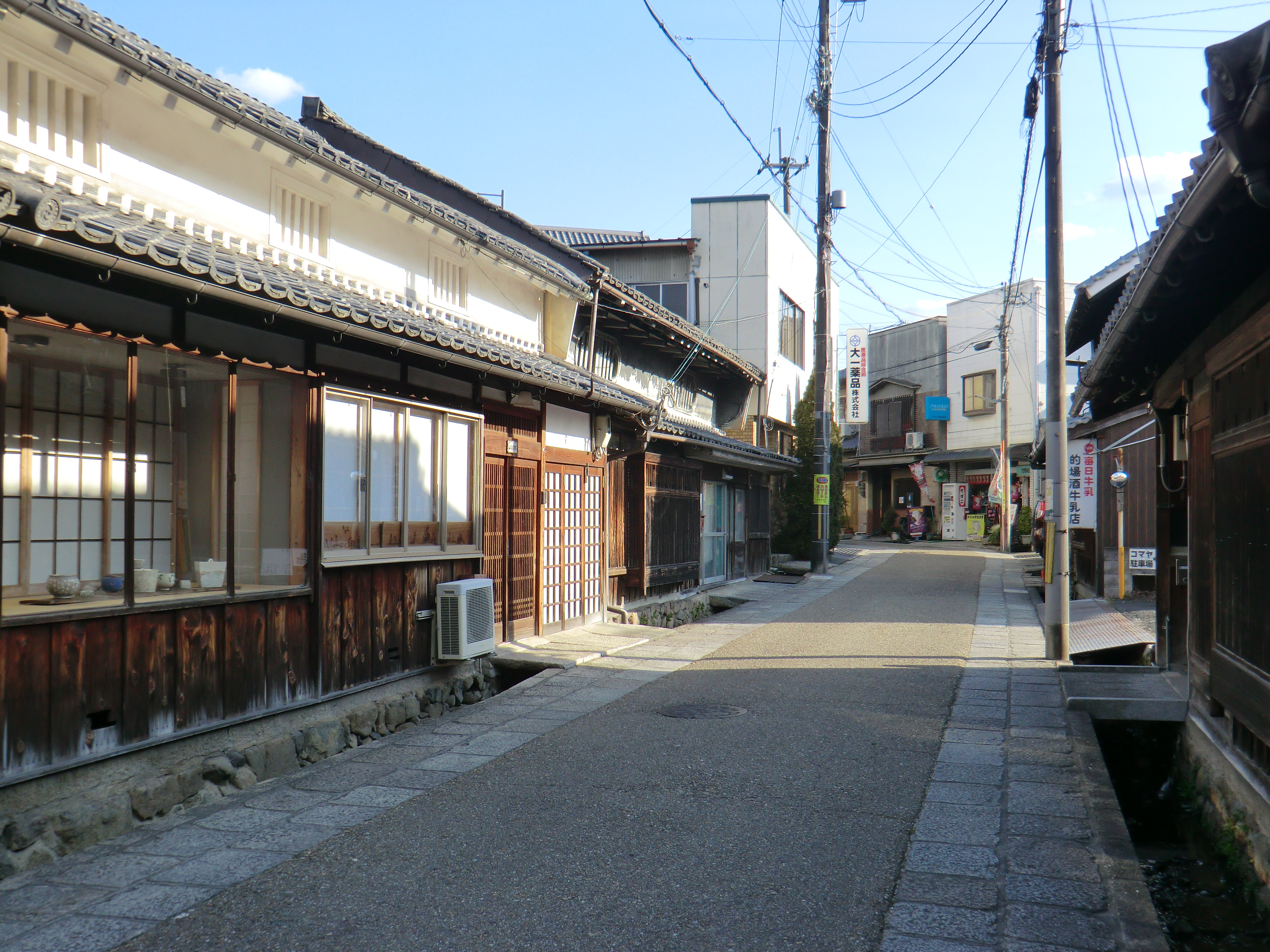 土佐街道 (奈良県高取町) 2018年2月